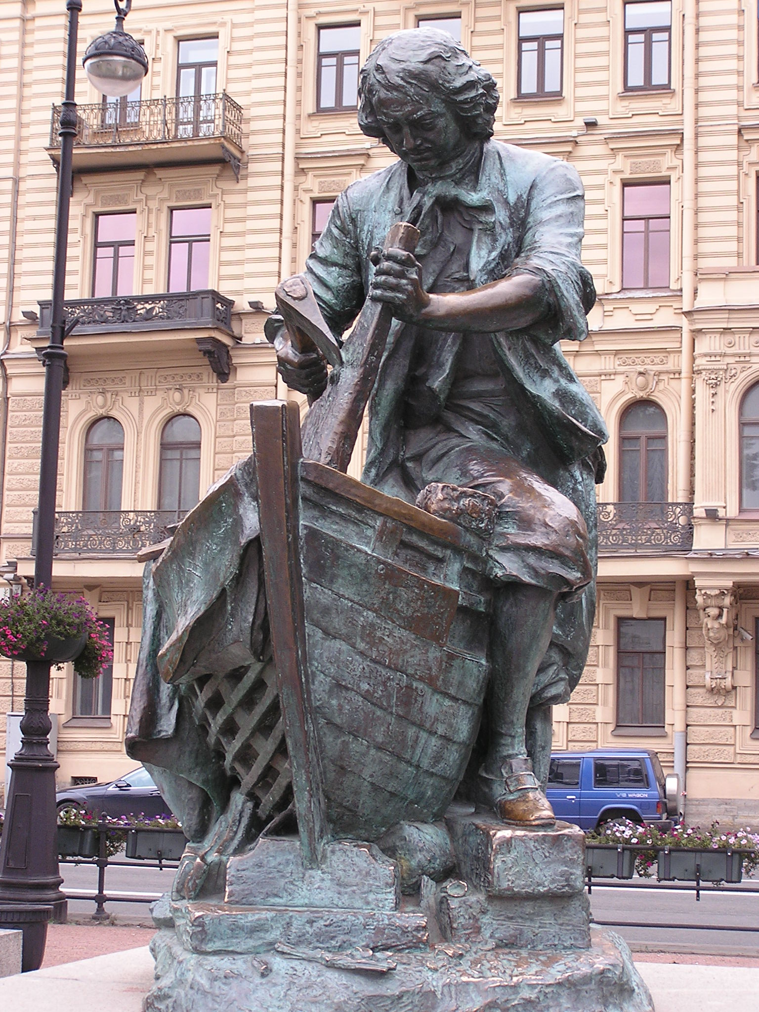 Санкт-Петербург. Пётр на Адмиралтейской набережной